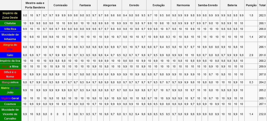 Resultados do Carnaval do Rio - 2016 - Grupo D